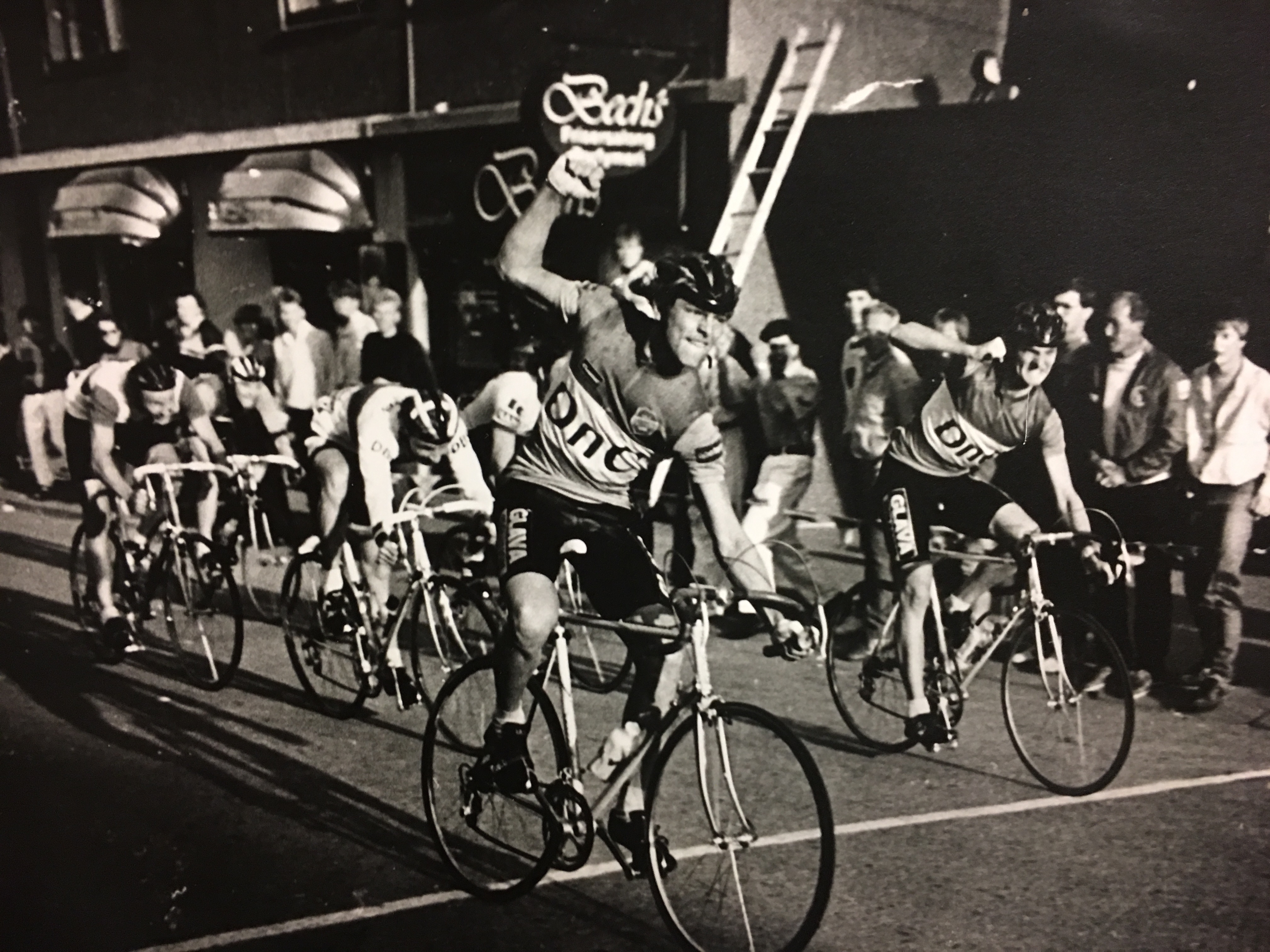 Østfold 3-dagers 1986, 1 etappe, 1. Geir Michael Enberg Jesinsky, 2. Øyvind Lauritzen, 3. Arnstein Hope